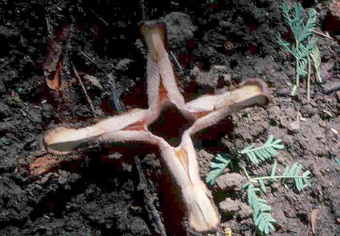 Hydnora johannis, Um Barona, Wad Medani, Sudan